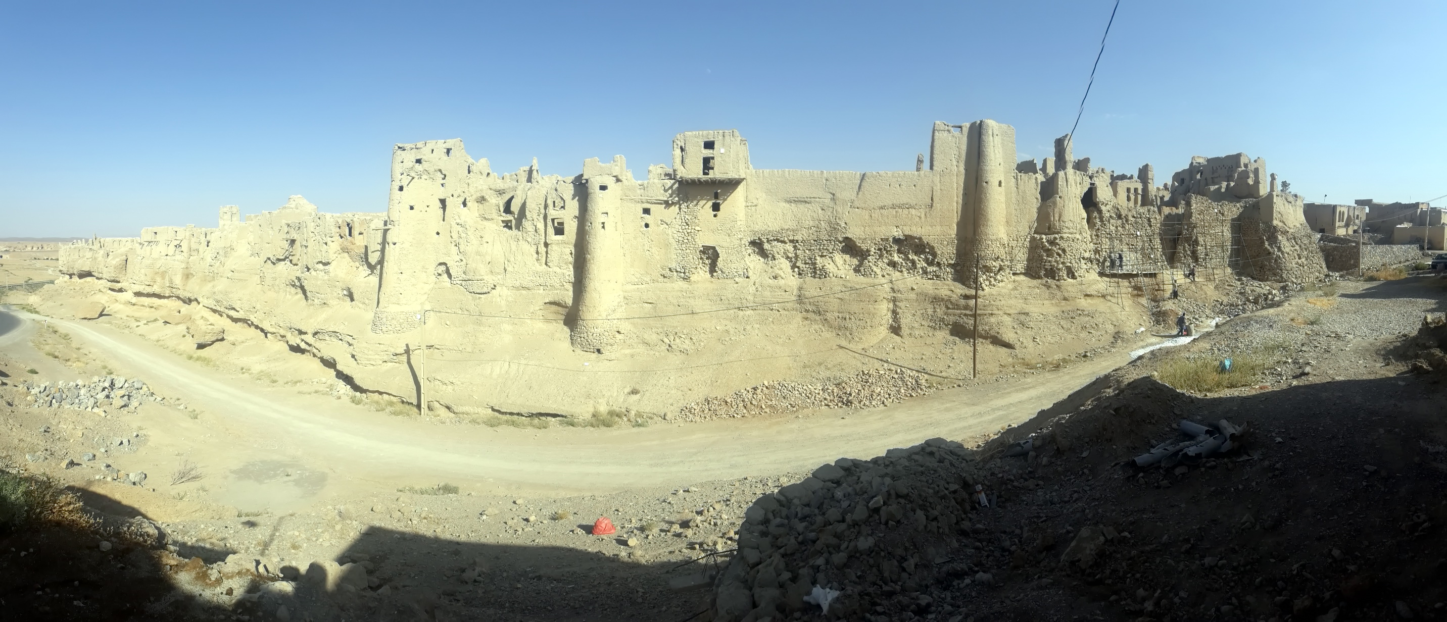 دژ ایزدخواست